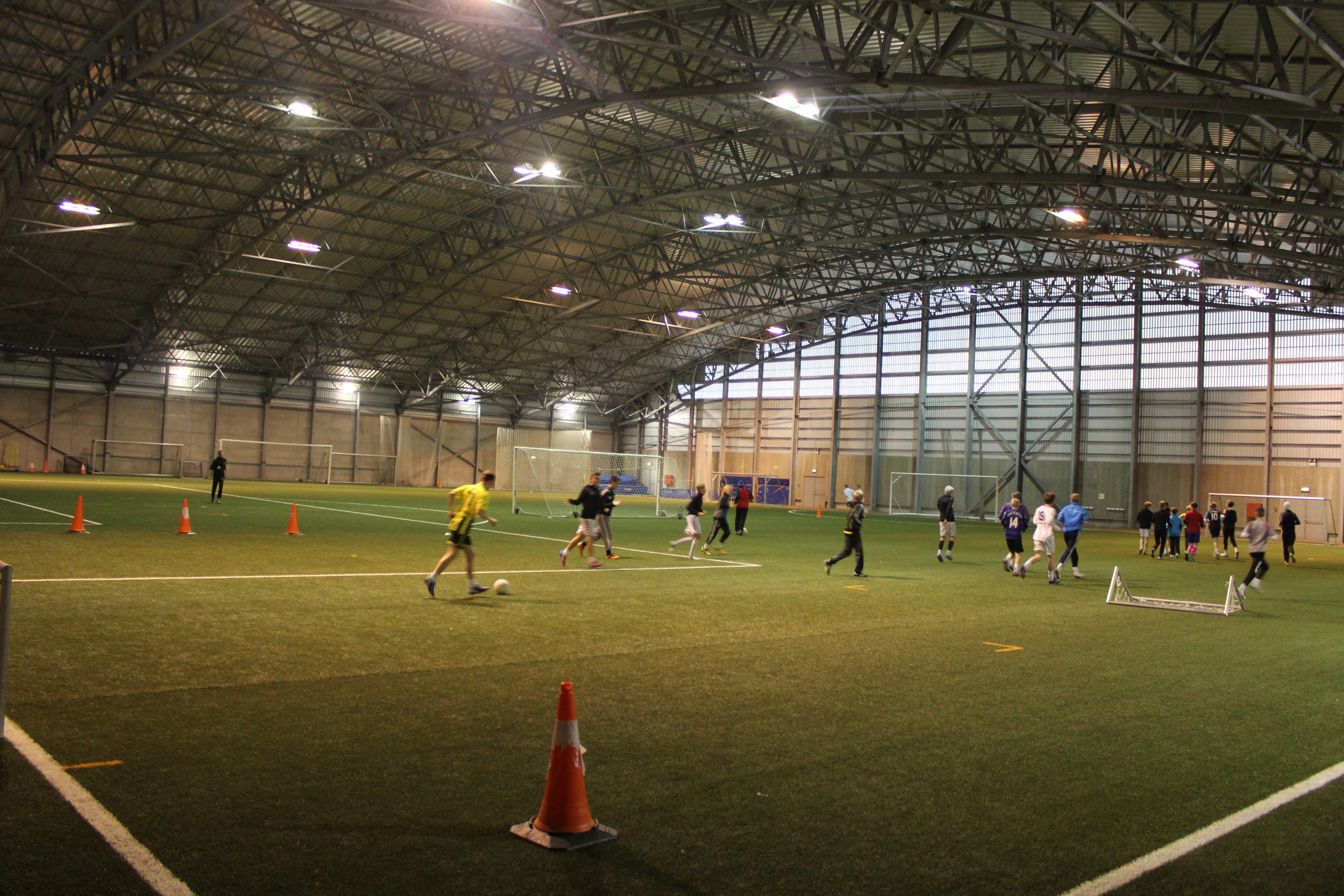 Eimskipshöllin í Vestmannaeyjum, knattspyrnuhús